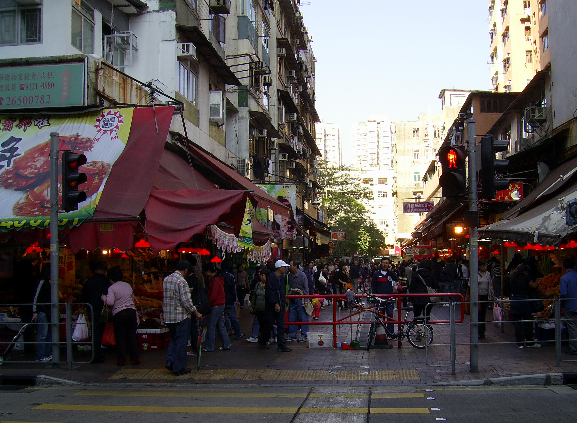 中文（香港）: 大光里